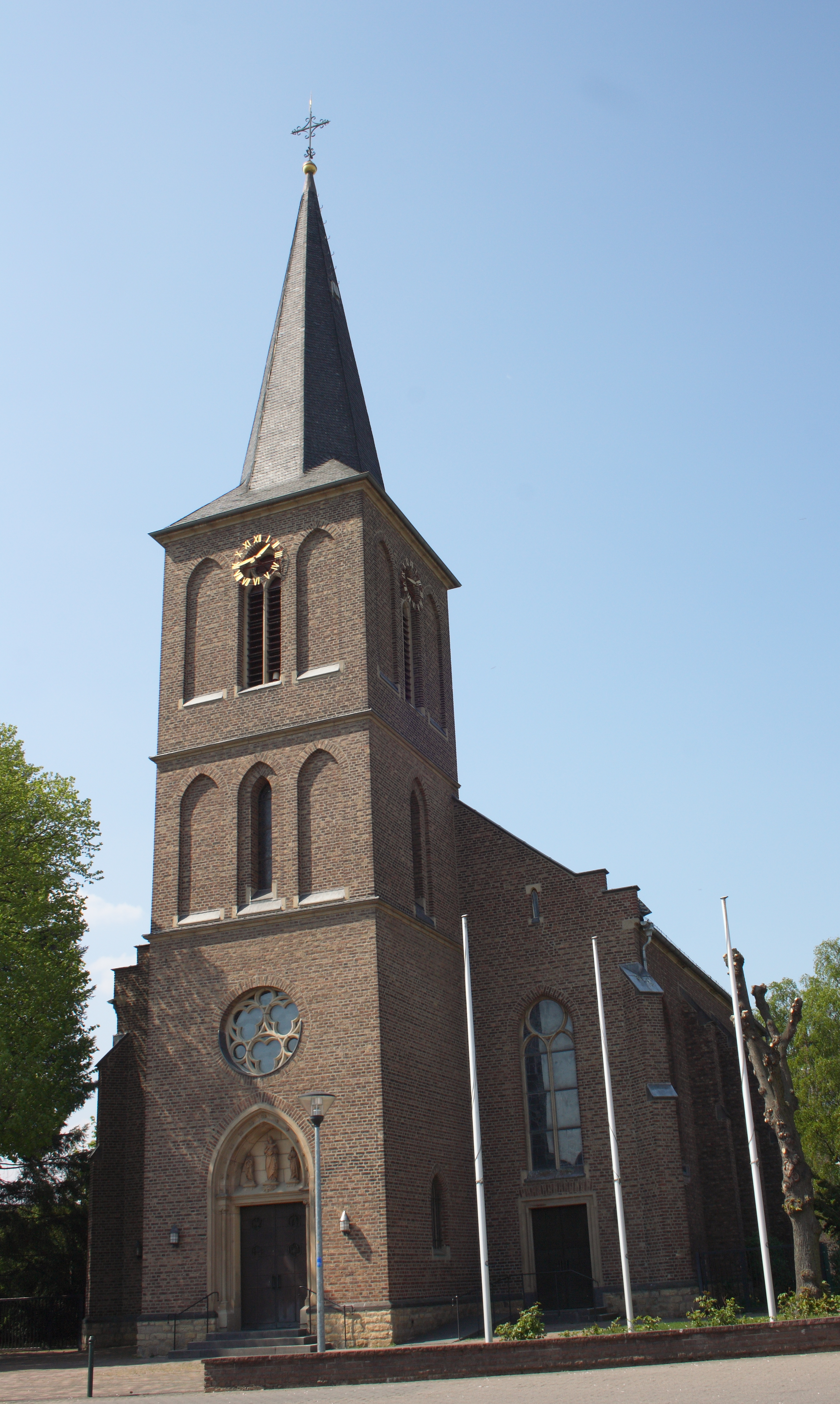 katholische Pfarrkirche St. Martin in Stotzheim